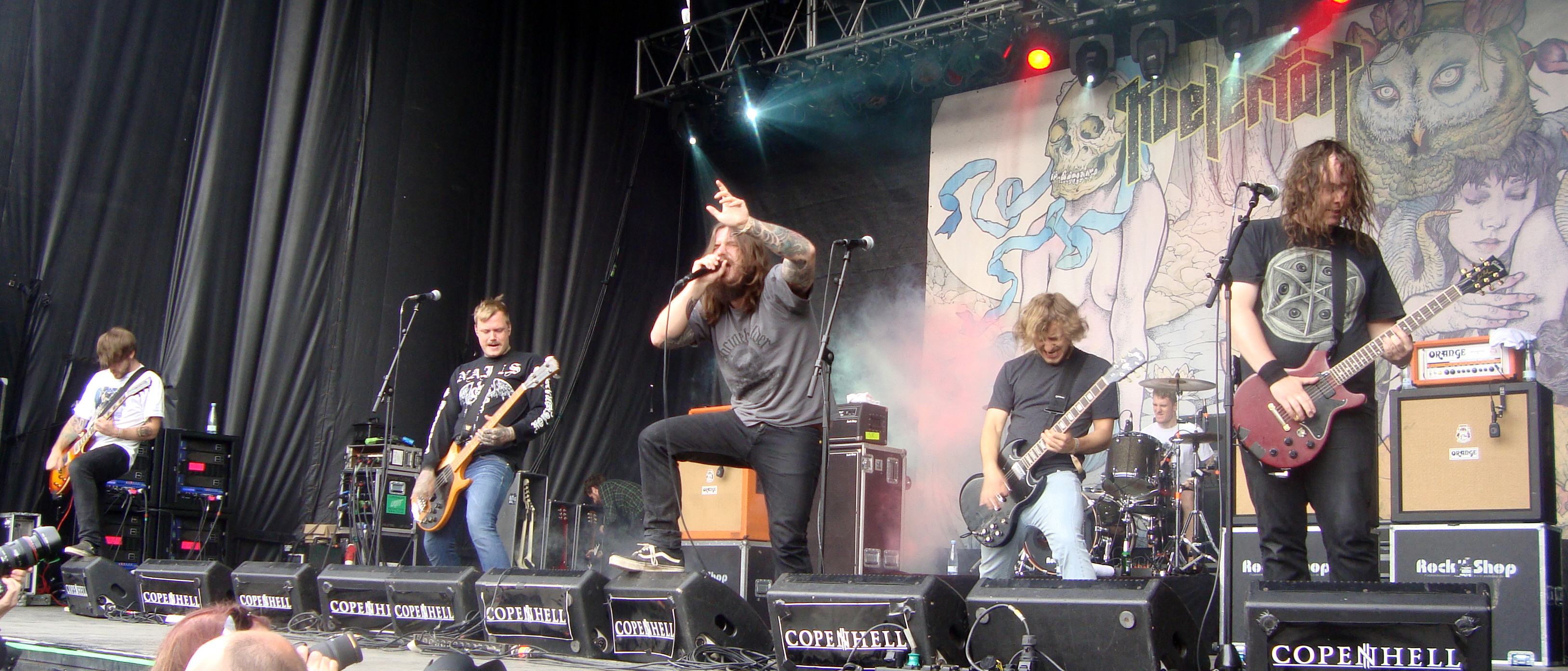 Kvelertak under deres koncert til festivalen Copenhell i København, den 18. juni 2011